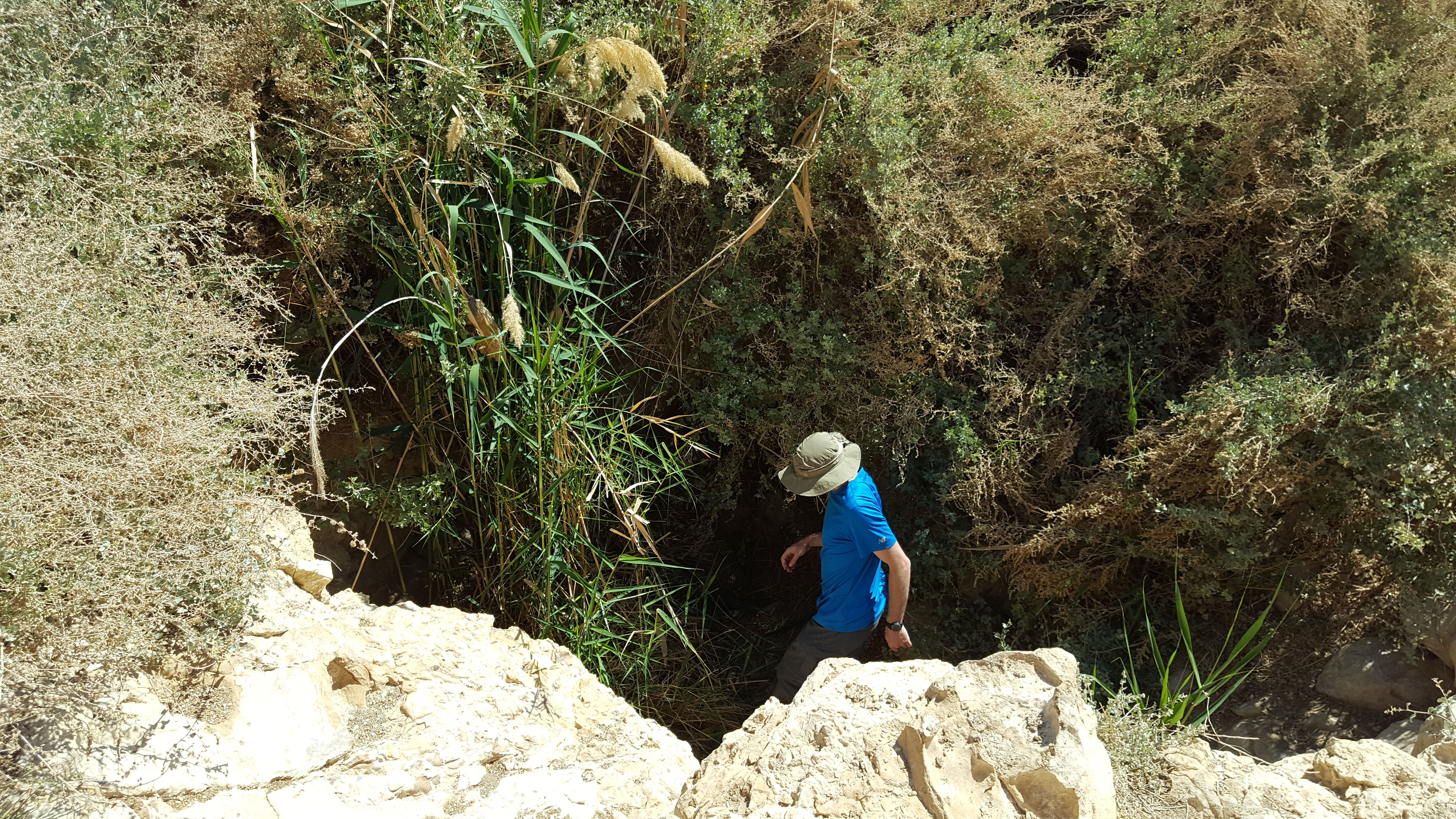 עין המערה. מעיין אשר דרישת הבעלות עליו גרמה לשינוי בשרטוט תוואי הגבול הבריטי-עותמני בשנת 1906